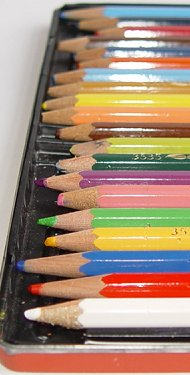 Eigen foto